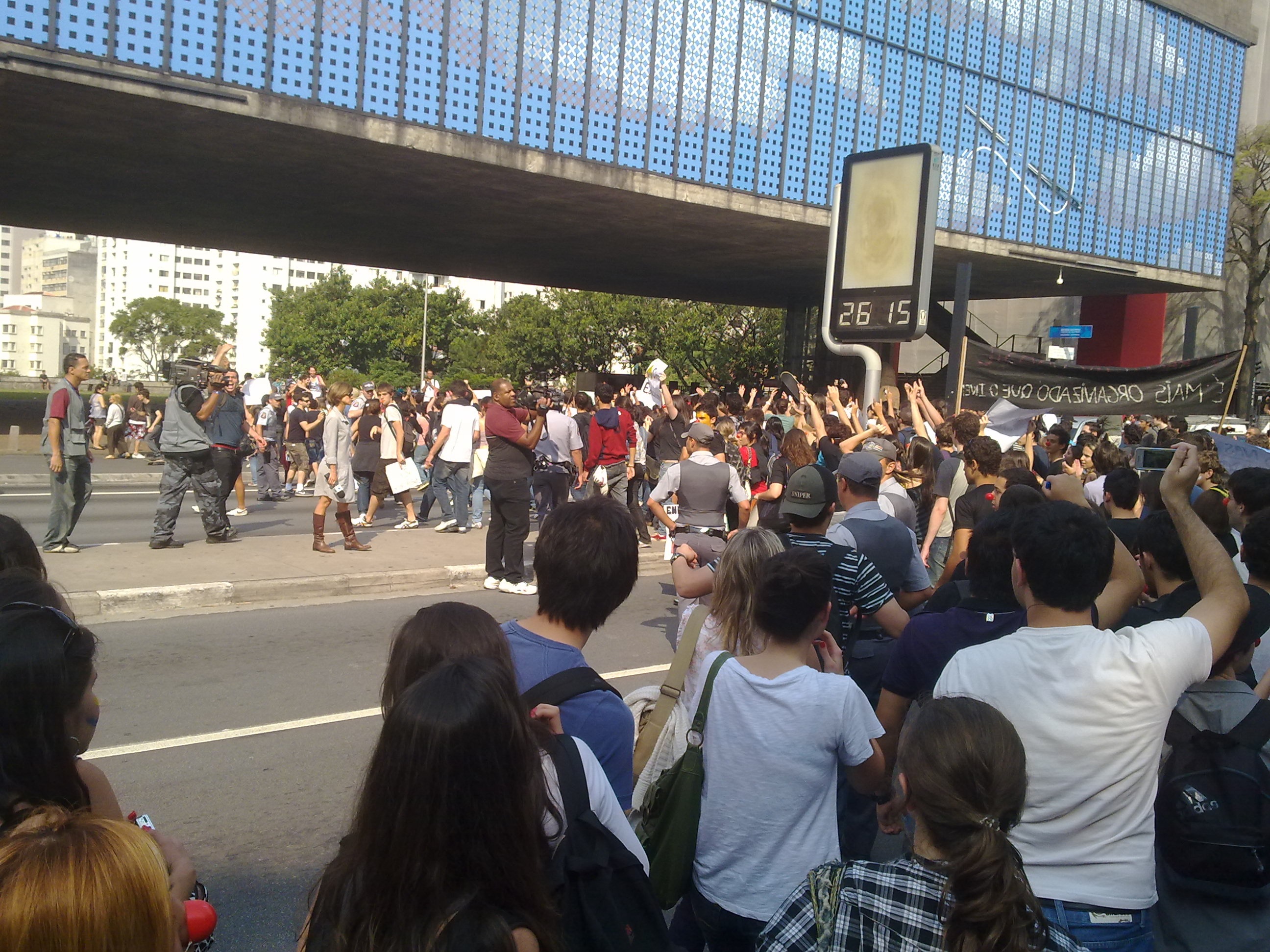 Protesto contra irregularidades no ENEM, feito na Avenida Paulista, São Paulo, Brasil